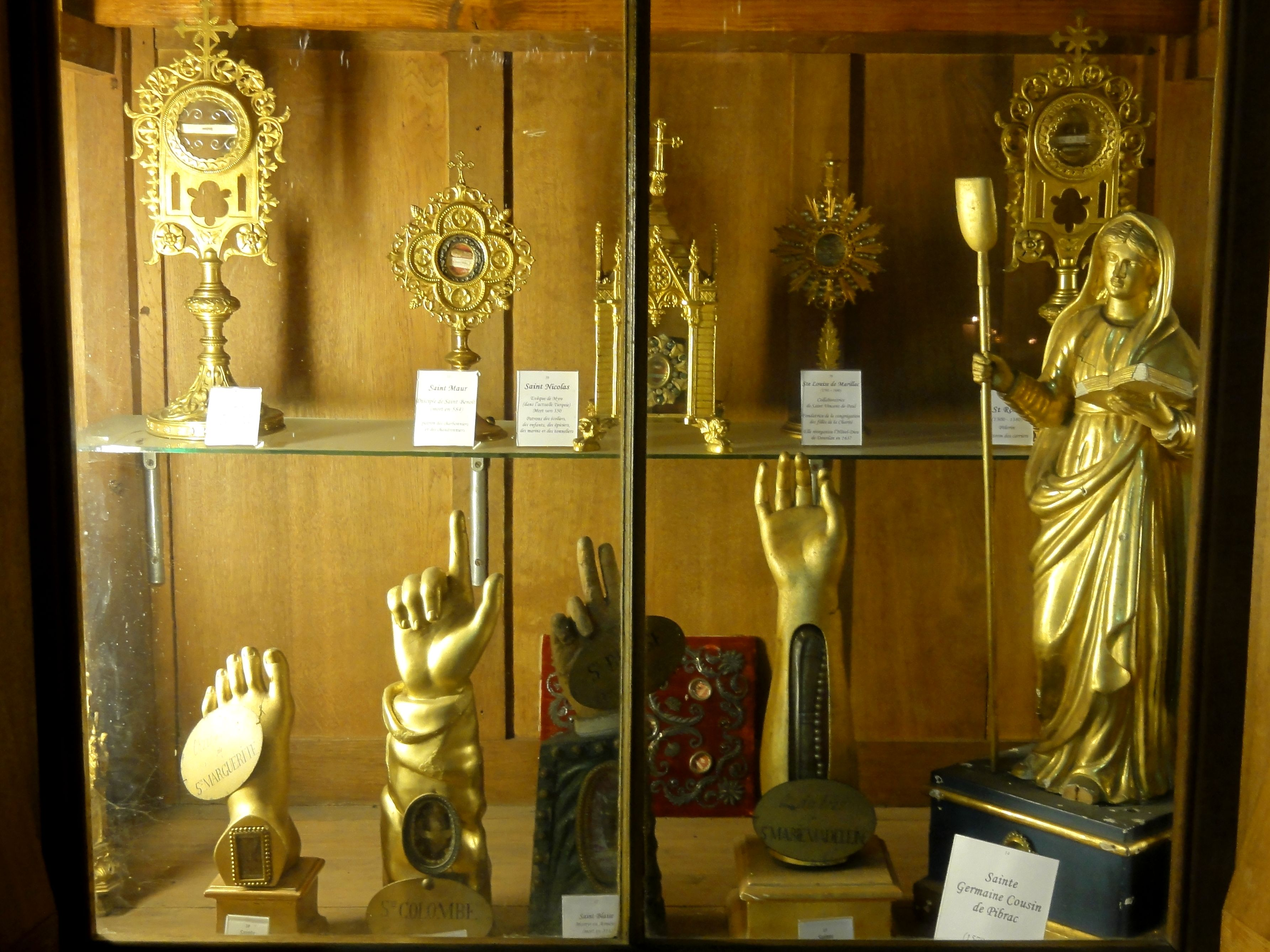 Grand reliquaire, 5e colonne, niveau bas.